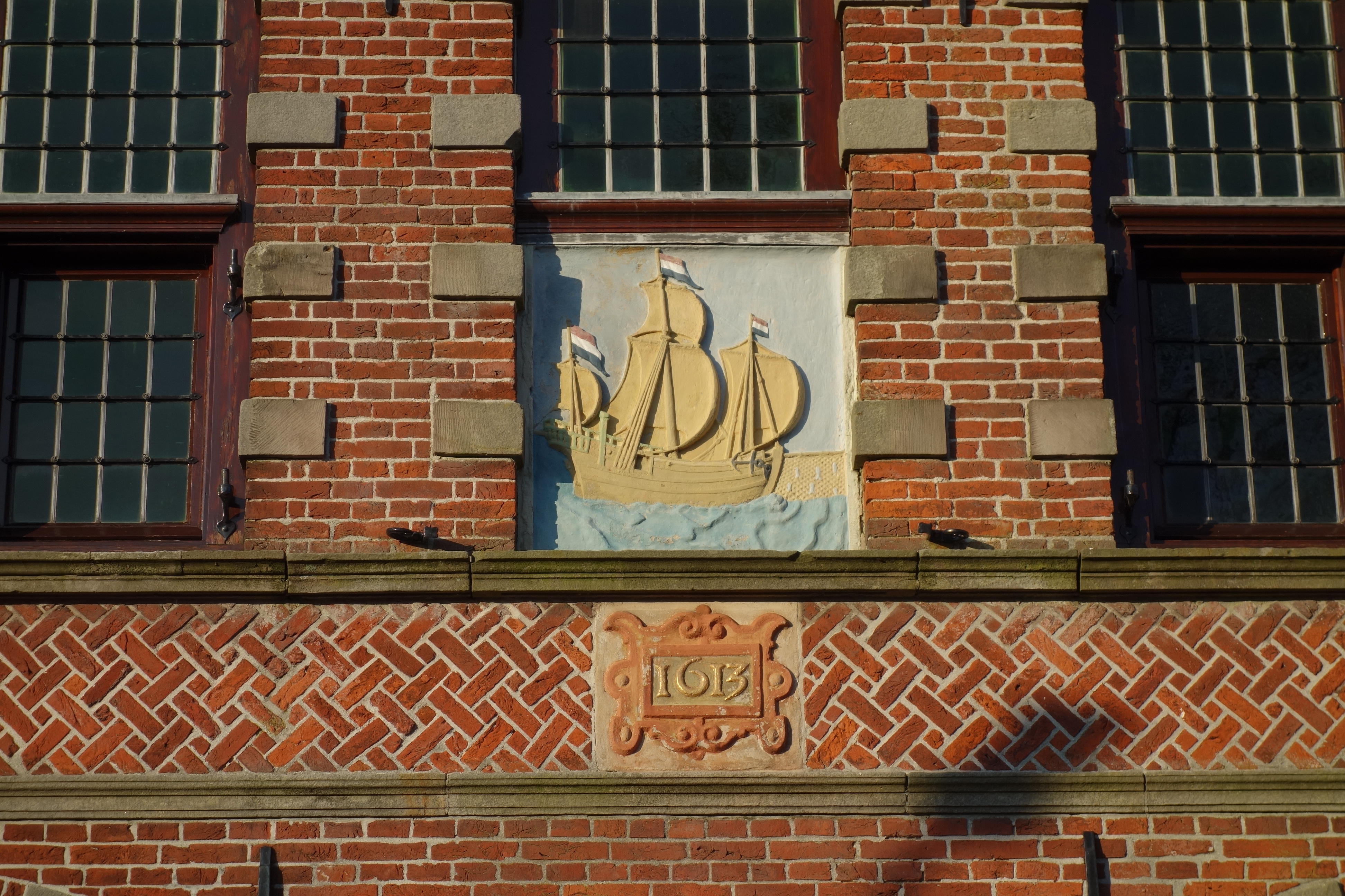 Gevelsteen in de zuidelijke gevel van het voormalig raadhuis aan de Raadhuisstraat in Graft.